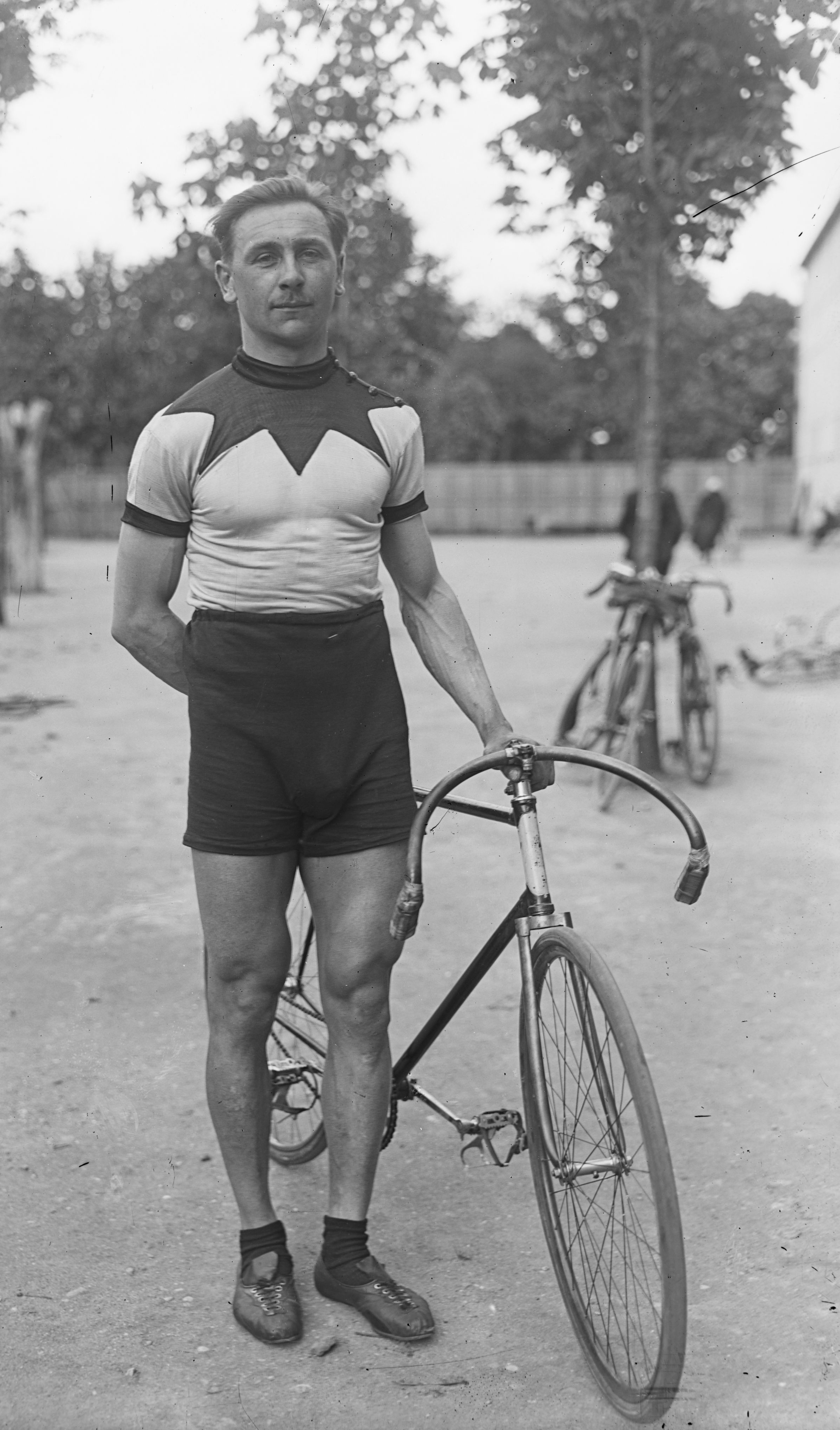 Le coureur cycliste Lucien Choury.